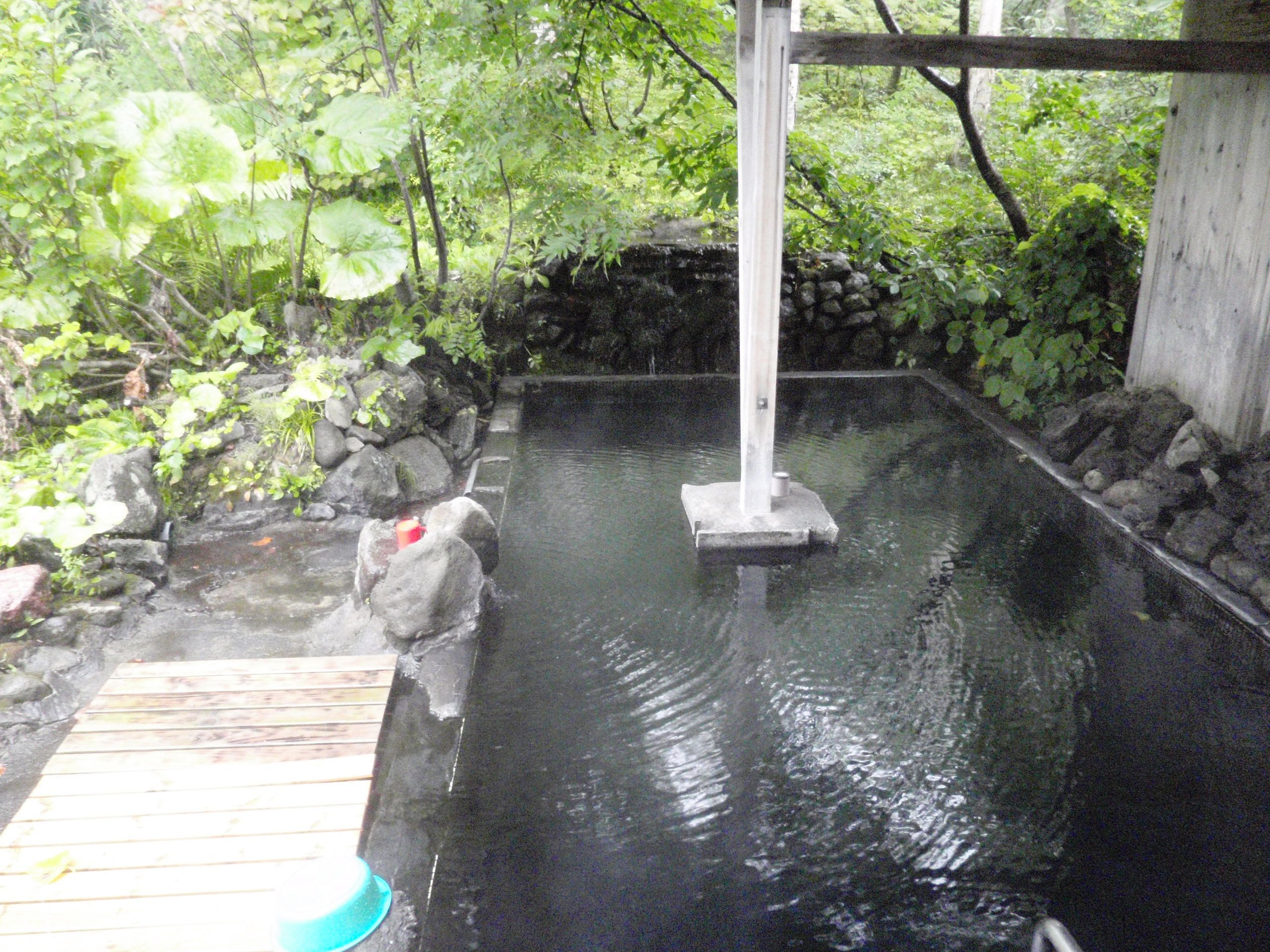 新見温泉ホテル露天風呂